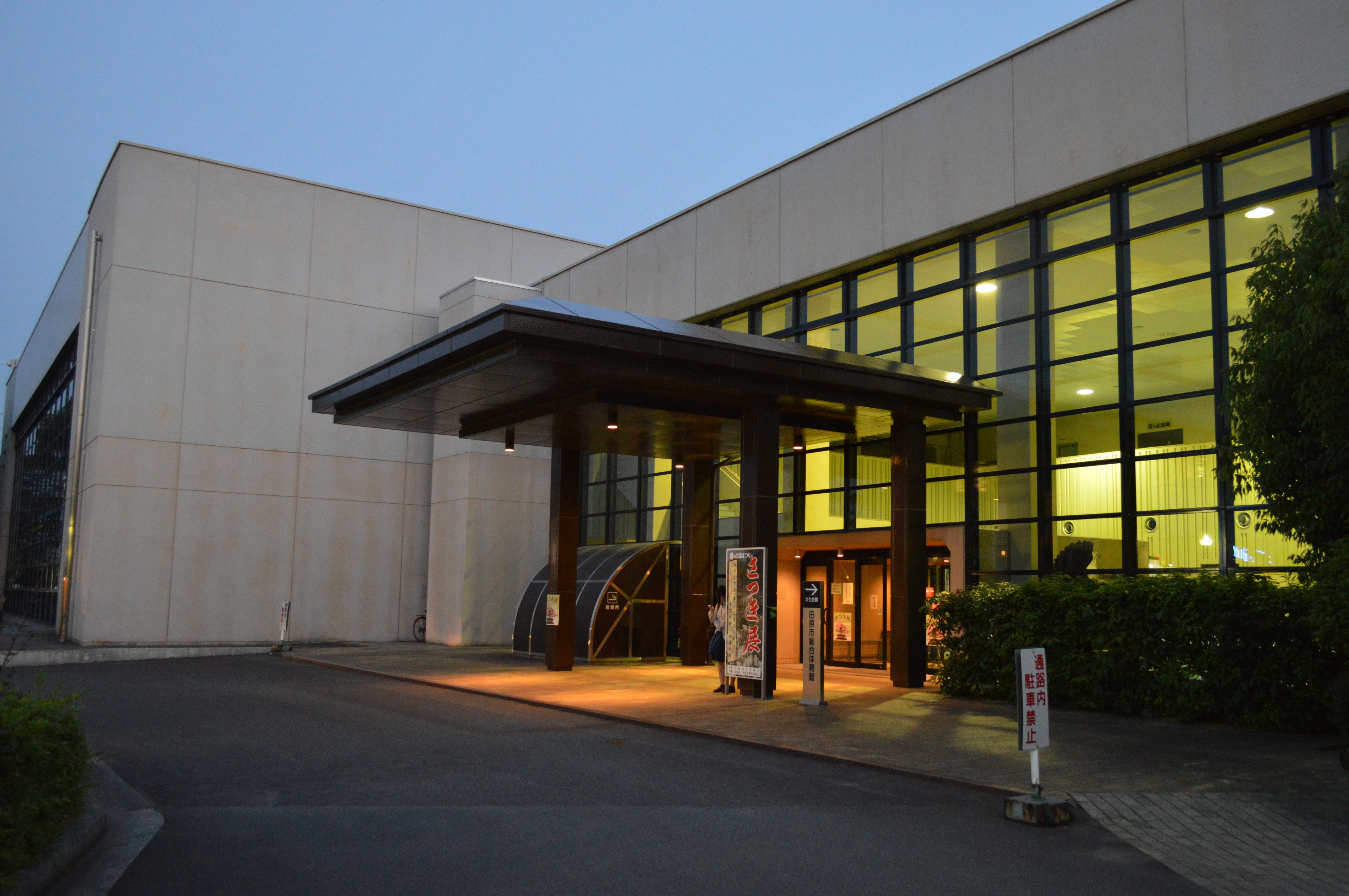 愛知県田原市 田原文化会館。田原市中央図書館（田原市図書館）、田原市総合体育館と敷地を共有。